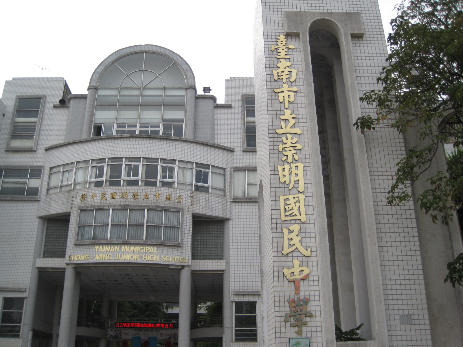 中文（台灣）: 臺南市崇明國中校門。